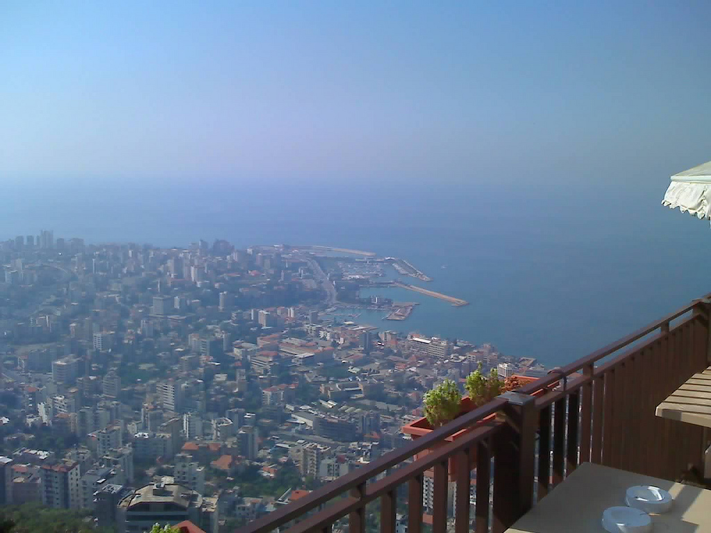 Beirut #1